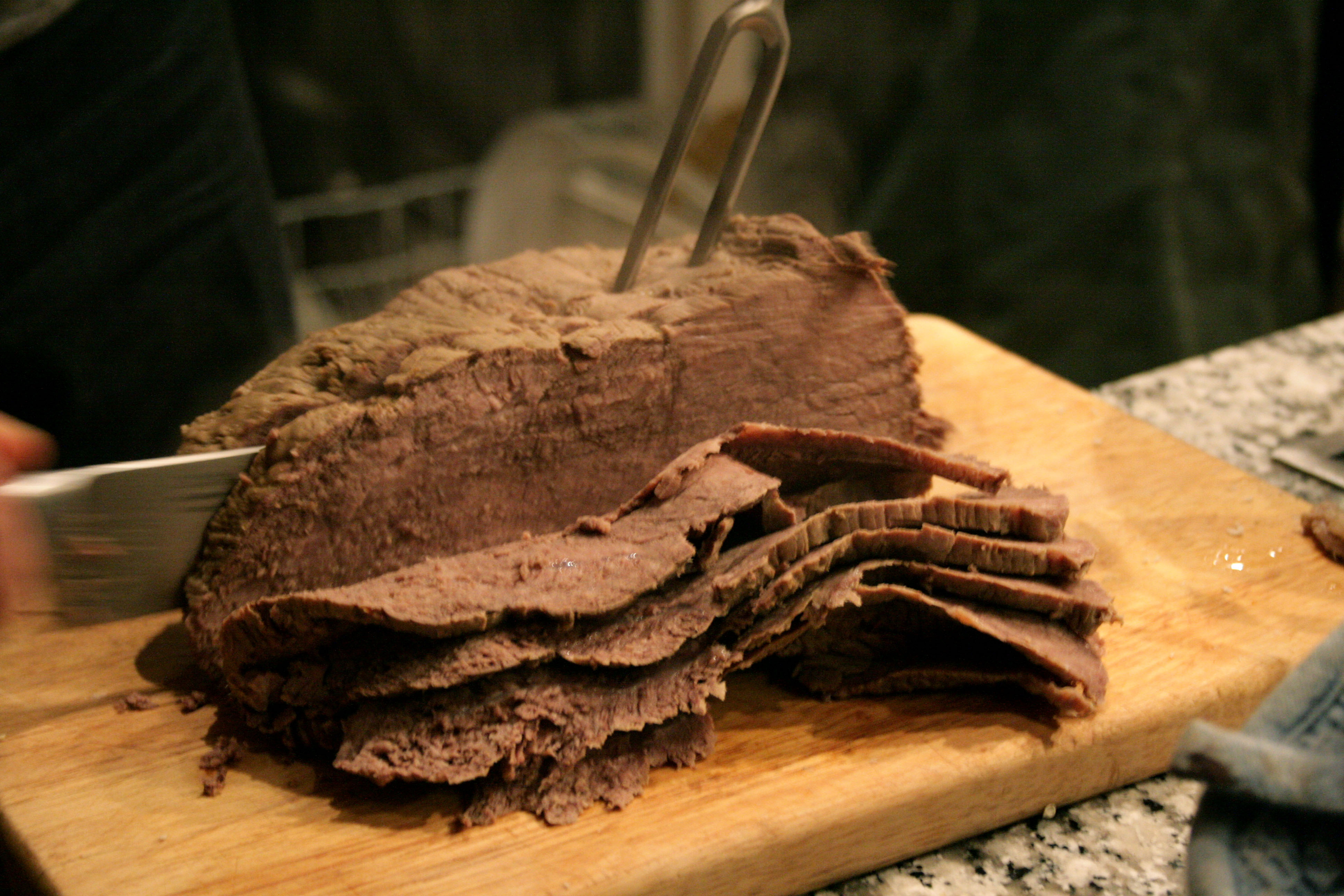 Tafelspitz (Tranchieren)